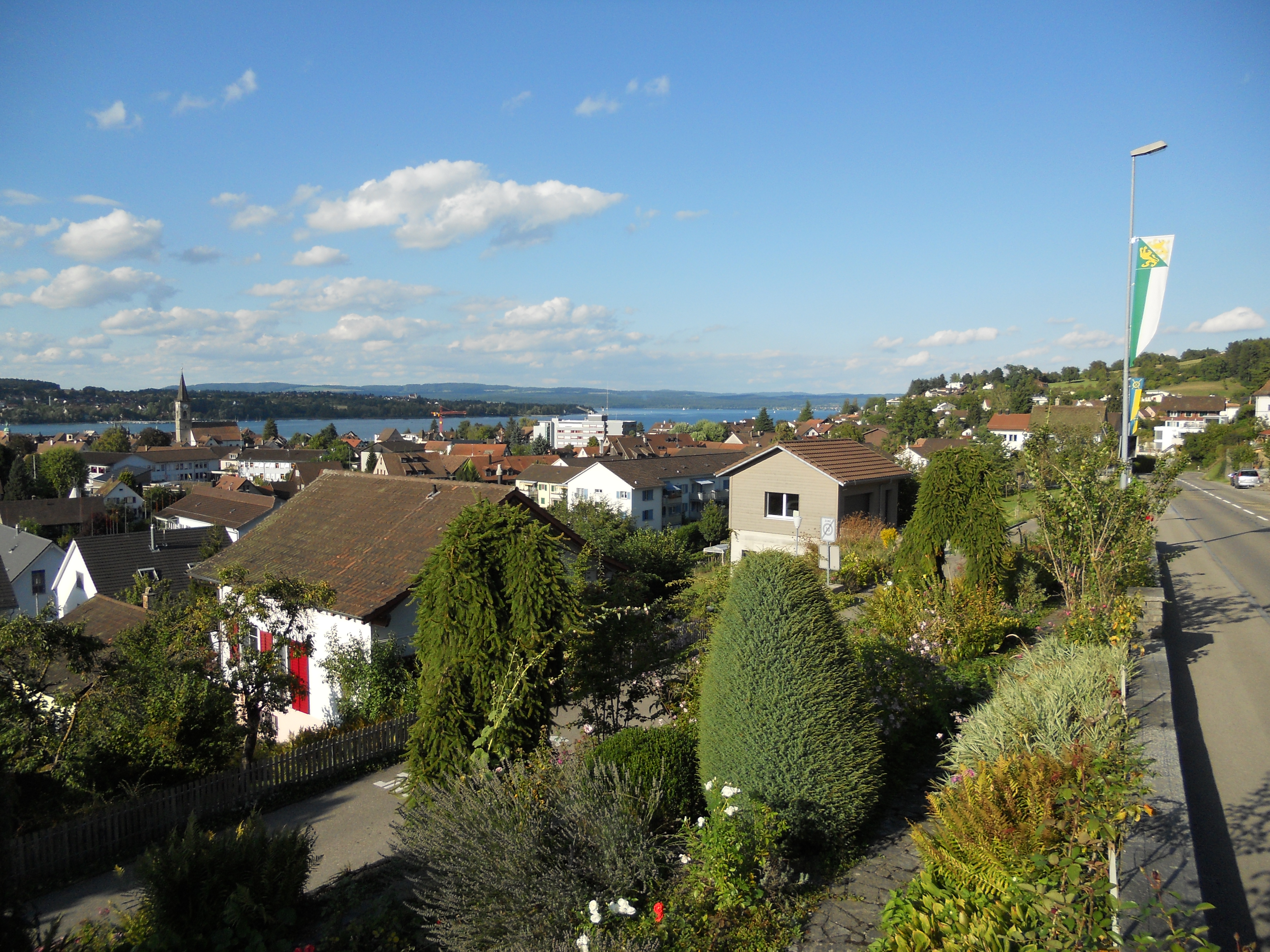 Aussicht auf die Stadt Steckborn im Thurgau. Im Hintergrund der Untersee.